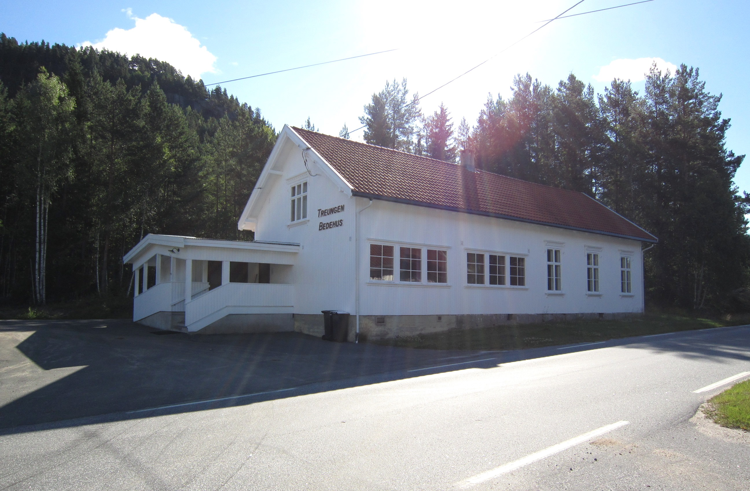 Fylkesvei 358 forbi Treungen bedehus